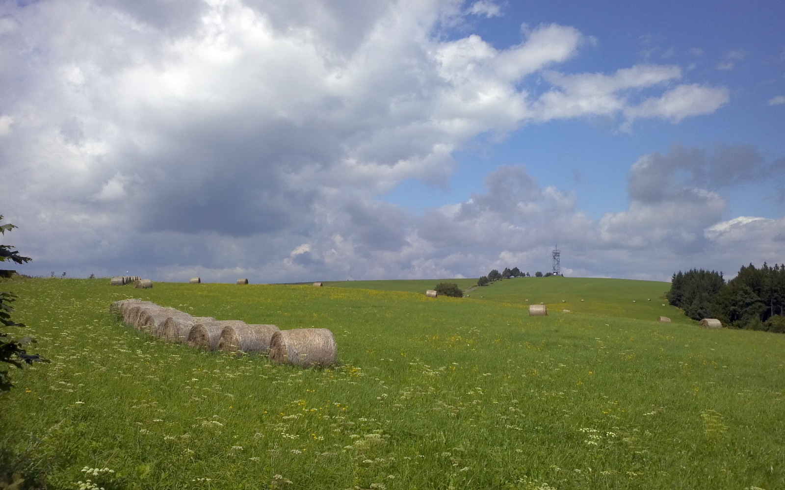 Vrch Val směrem od Horní Orlice - rozcestí